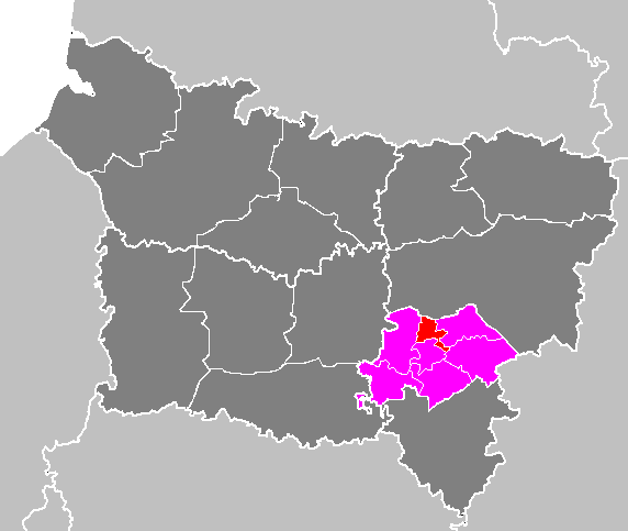 Maps of arrondissements and cantons of France: Arrondissement de Soissons - Canton de Soissons-Nord.PNG